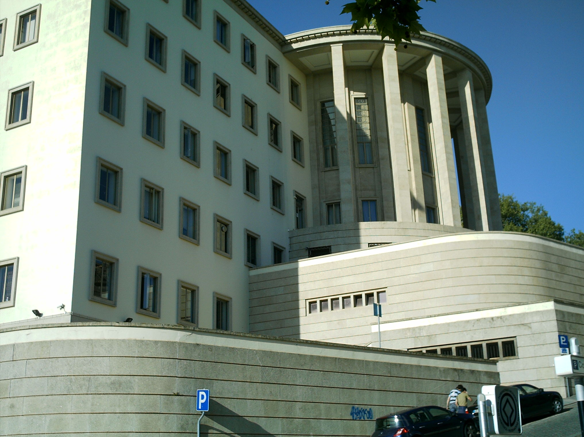 Tribunal da Relação do Porto no Palácio da Justiça, Campo dos Mártires da Pátria, freguesia de Miragaia, Porto, Portugal.